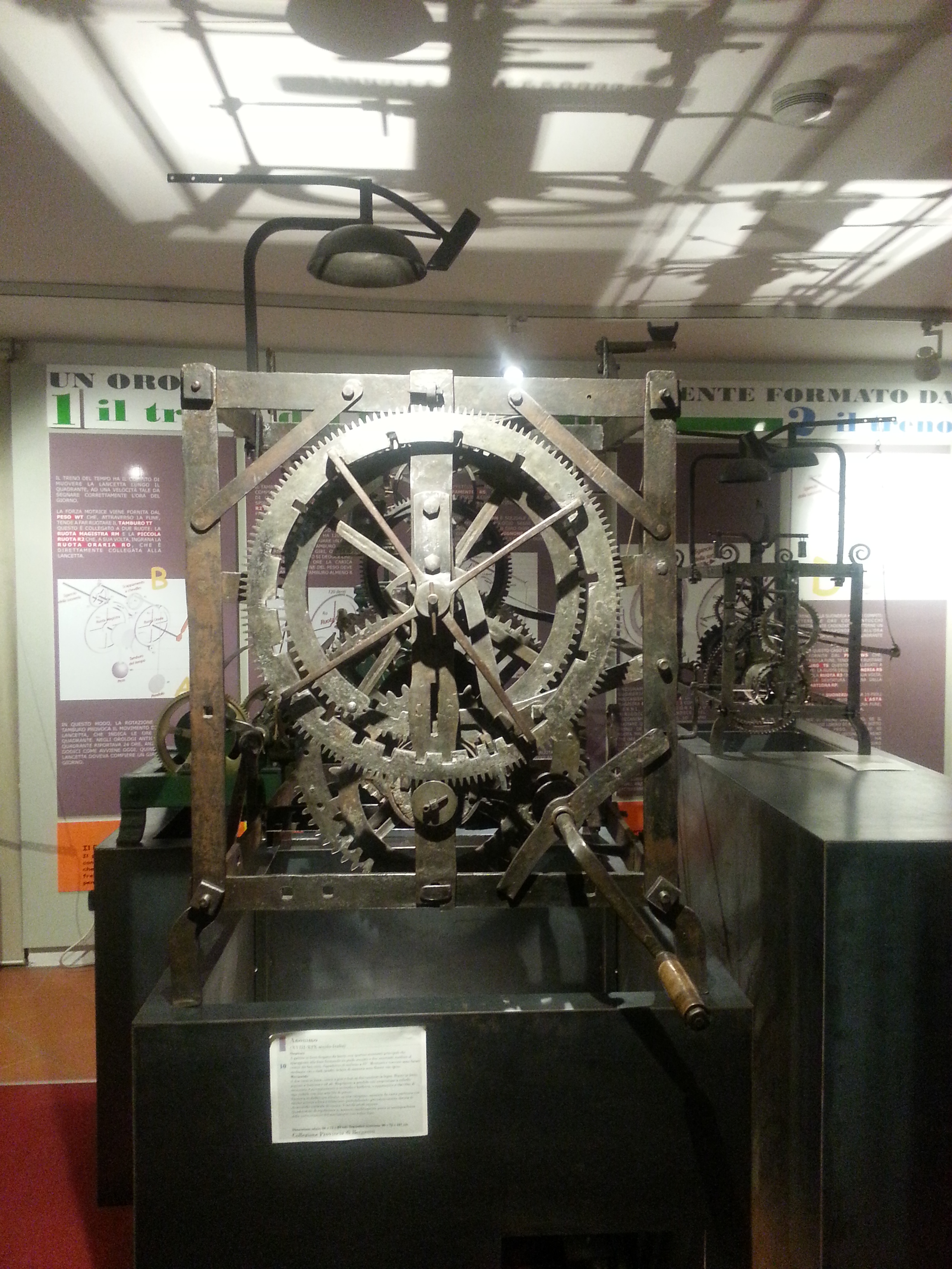 Orologio con meccanismo presente al MAT Museo Arte tempo